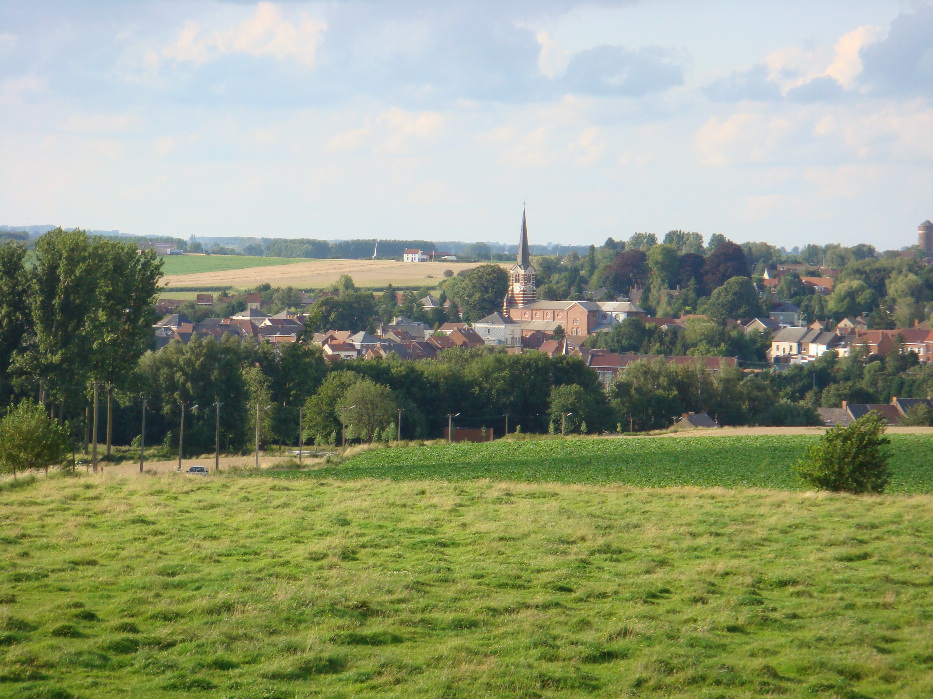 Panorama du village de Rebecq